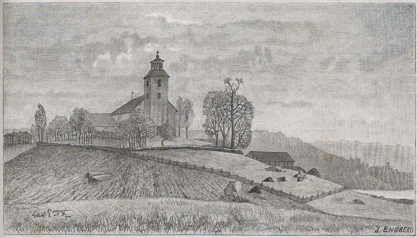 Kättilstads kyrka i Linköpings stift, Östergötland, Sverige.